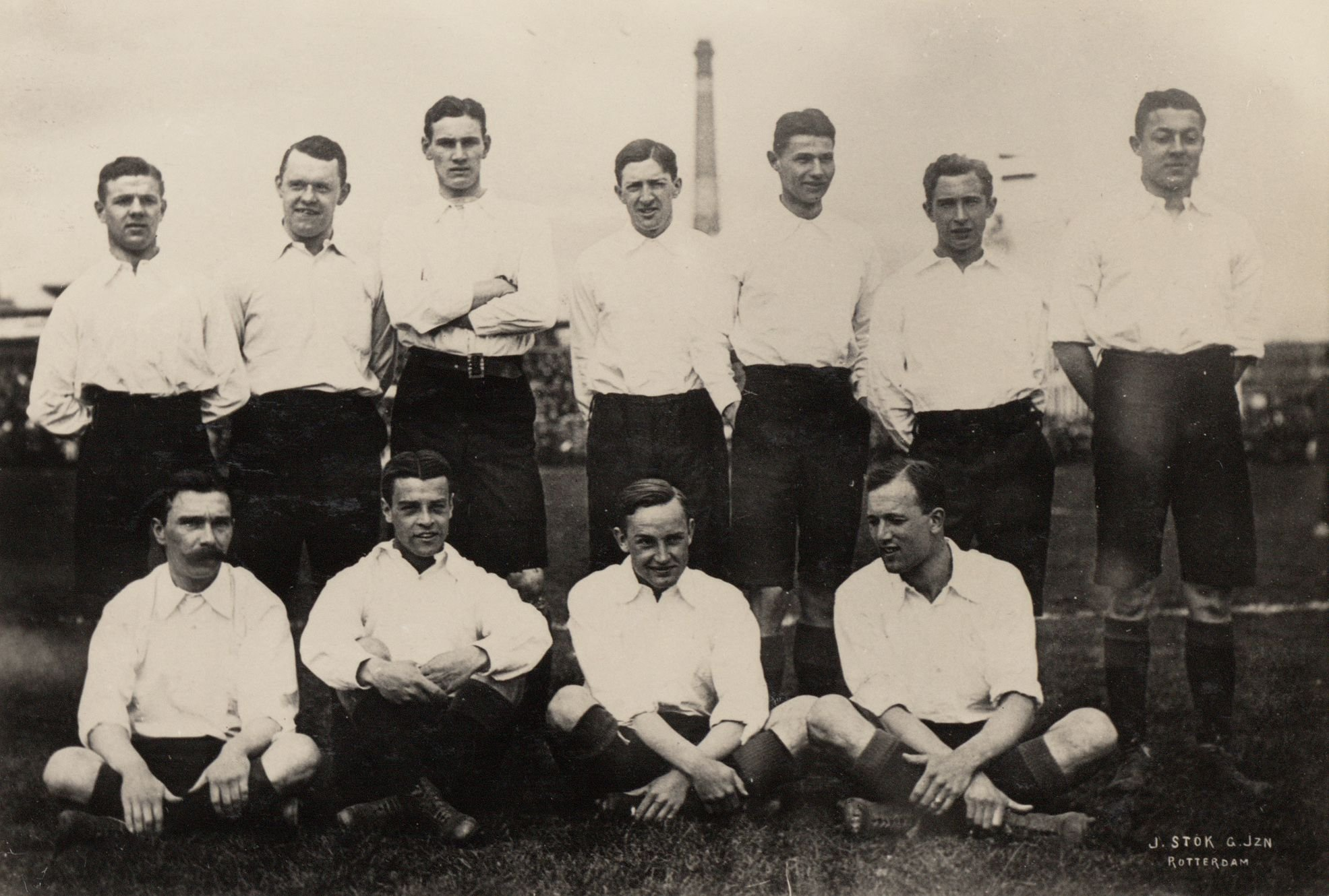 Nederlands elftal voor de interland tegen België. Staand, van links naar rechts: Gé Fortgens, Constant Feith, Just Göbel, John Heijning, Gerrit Bouwmeester, Nol van Berckel en Jan van Breda Kolff. Zittend: Bok de Korver, Mannes Francken, Guus de Serière en Jan Thomée. Nederland - België (4-3), gespeeld op 28 april 1912 op het DFC-terrein te Dordrecht. Opstelling: Just Göbel (Vitesse), Constant Feith (HVV), John Heijning (HVV), Gé Fortgens (Ajax), Bok de Korver (Sparta, aanvoerder), Gerrit Bouwmeester (Haarlem), Jan van Breda Kolff (HVV), Guus de Serière (HVV), Mannes Francken (HFC), Jan Thomée (Concordia) en Nol van Berckel (Quick Nijmegen)